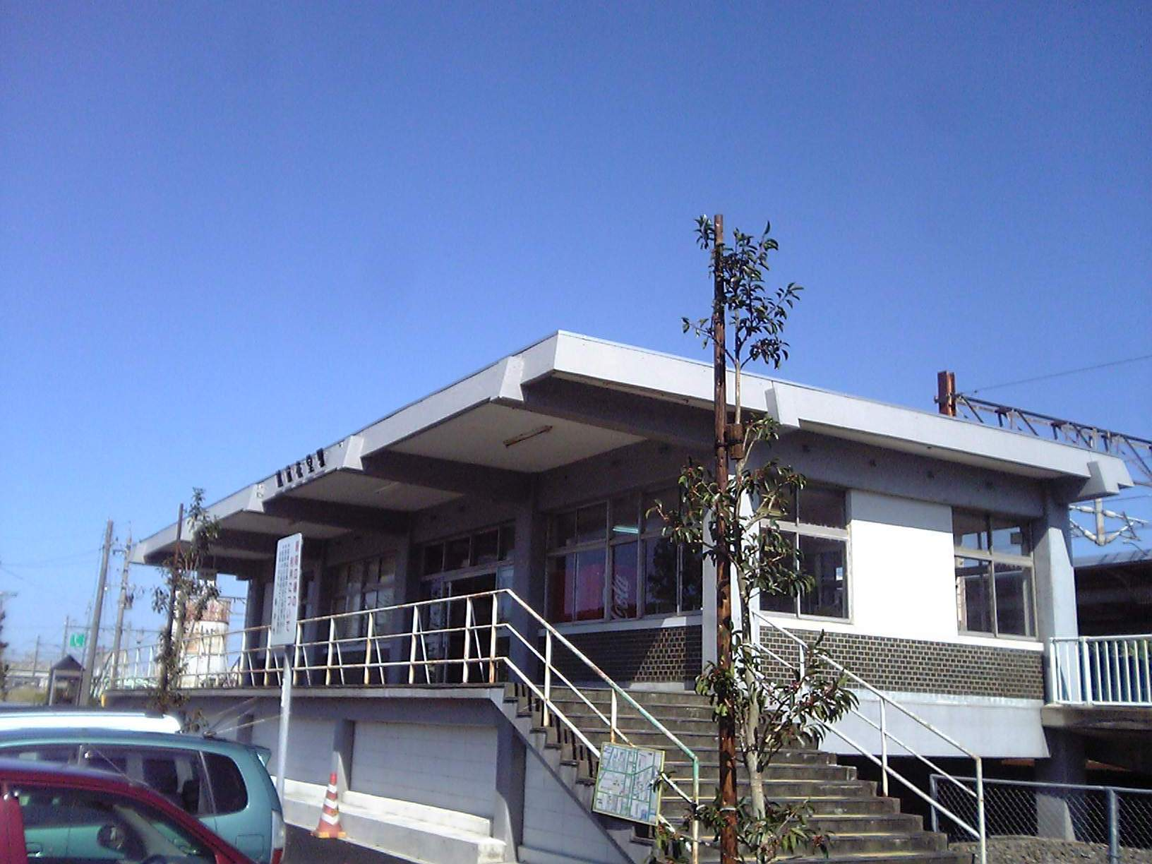 越前花堂駅舎(2009/10/12撮影）